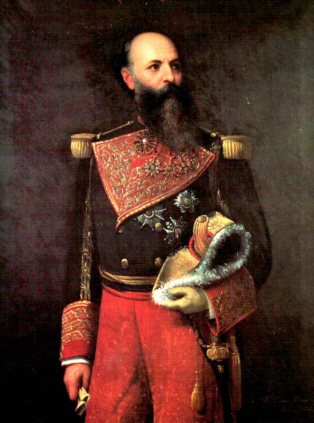 Antonio Guzman Blanco. Oleo sobre Tela. Ministerio de Relaciones Exteriores.